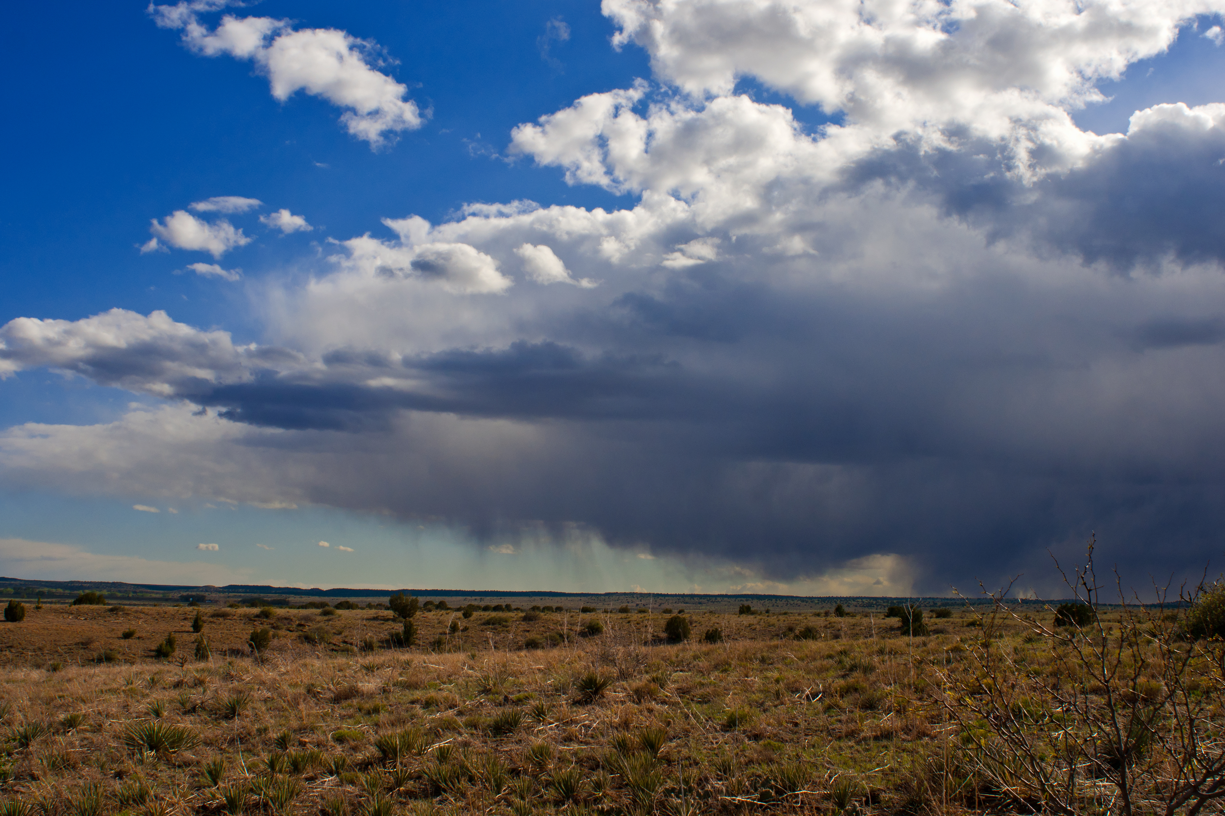 Black Mesa State Park, Oklahoma